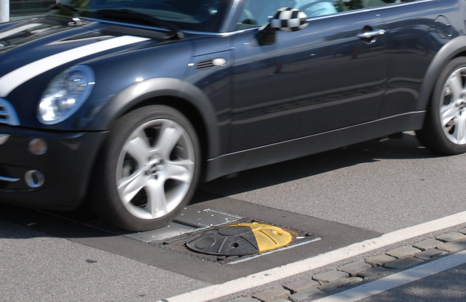 Überfahrt eines PKW über das Reifenmesssystem der Firma ProContour bei der Einfahrt in ein Autohaus in NRW